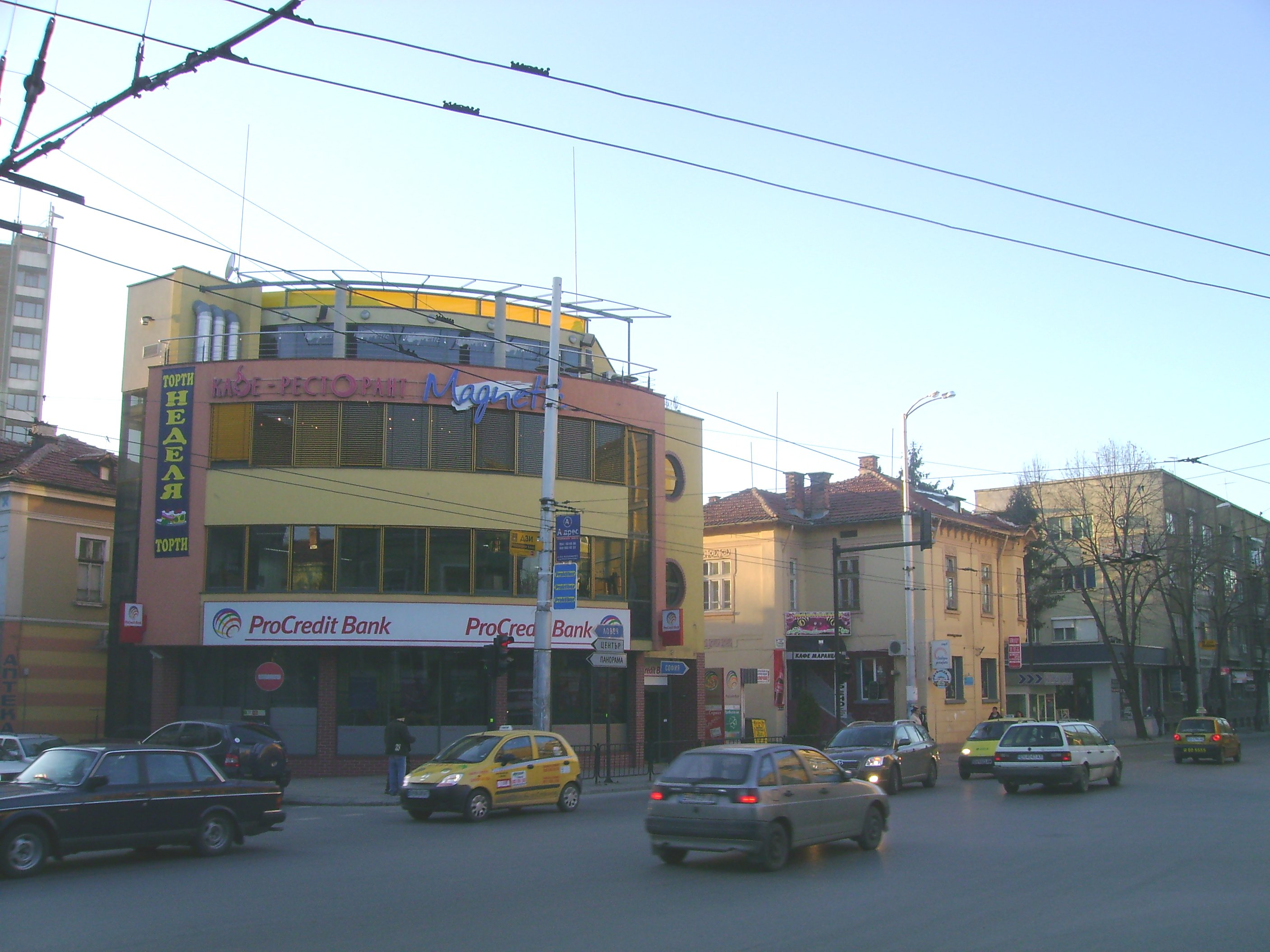 Градски център / City centre